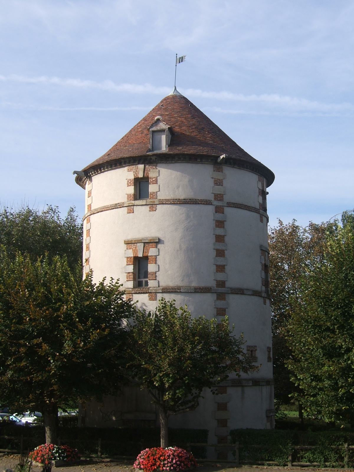 Ancien colombier de Bussy-Saint-Georges (Seine-et-Marne, France)